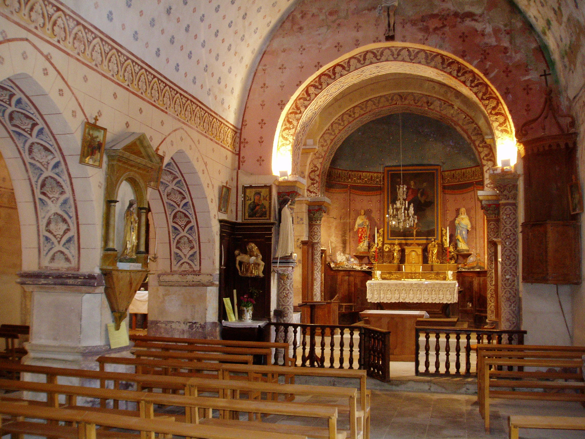 Nef et choeur. Peintures murale de Lamy, 1896.